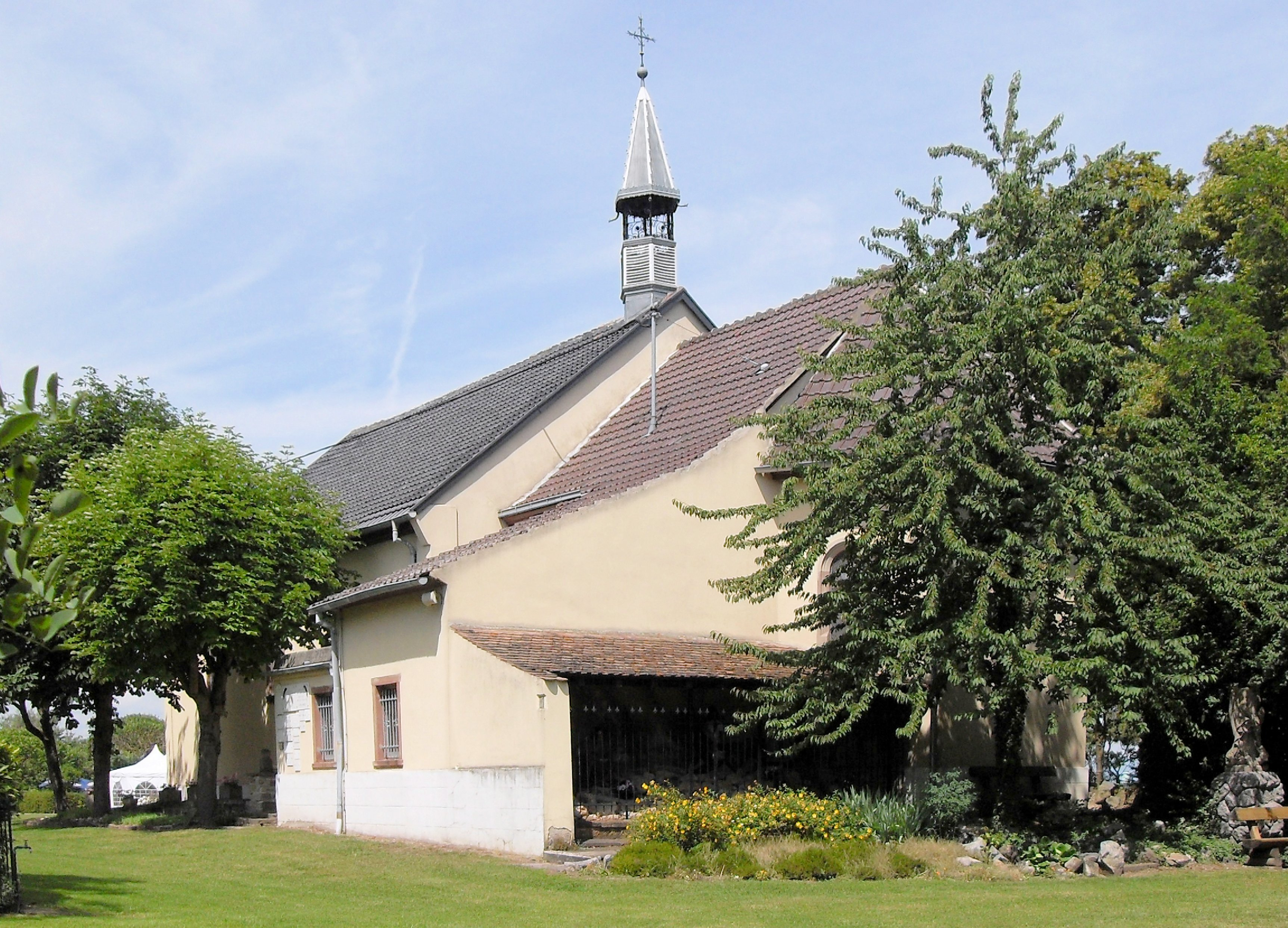 La chapelle Notre-Dame-de-Thierhurst et Notre-Dame-des-Douleurs à Heiteren